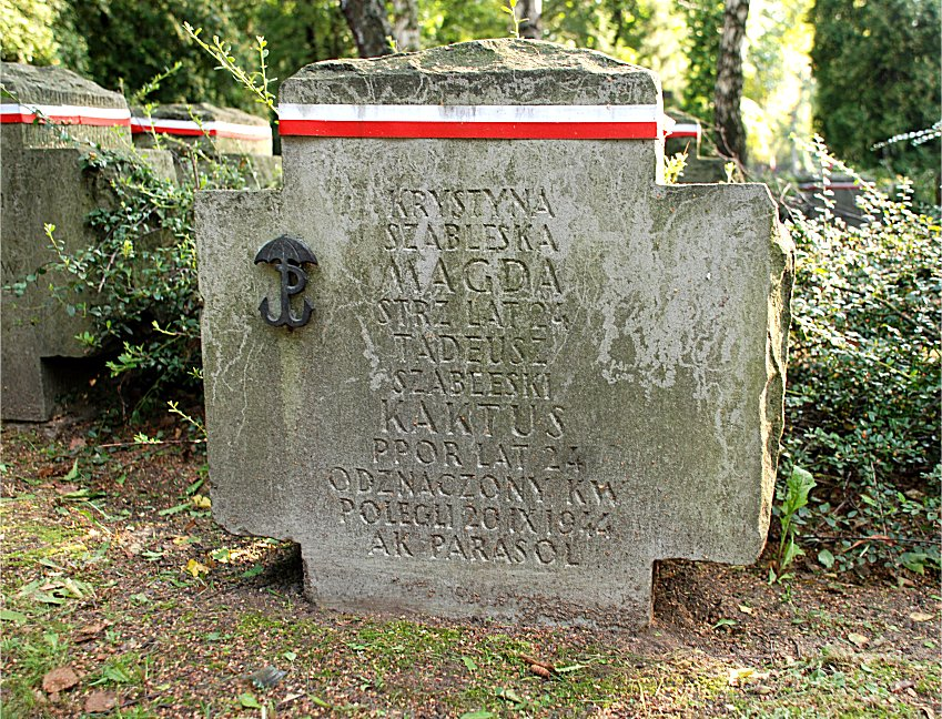 Grób Szabelskich na Powązkach